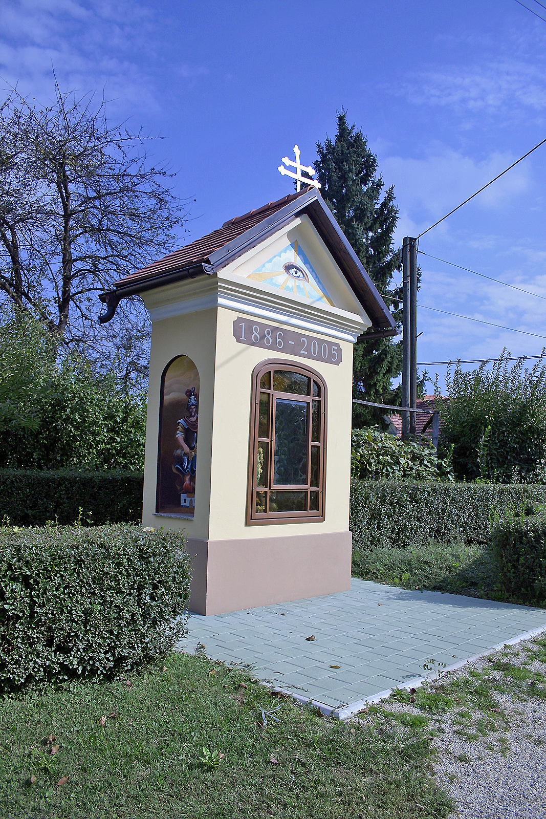 Perdigalova kapelica, Dokležovje. Perdigal small chapel, Dokležovje. Perdigal kleine Kapelle, Dokležovje.